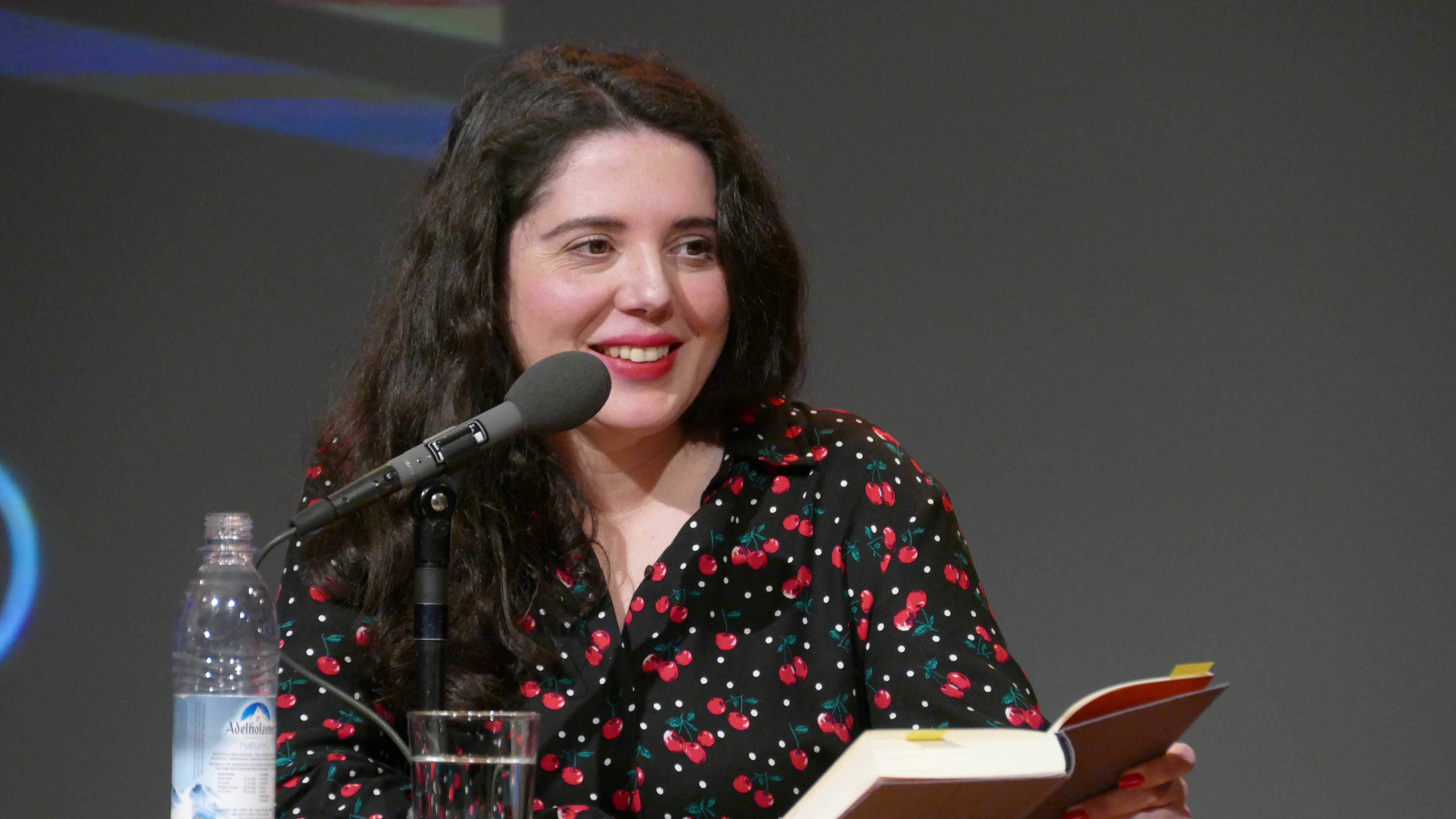 Marjana Gaponenko liest bei den Wortspielen 2019 in München aus ihrem Roman "Der Dorfgescheite" (C.H. Beck)